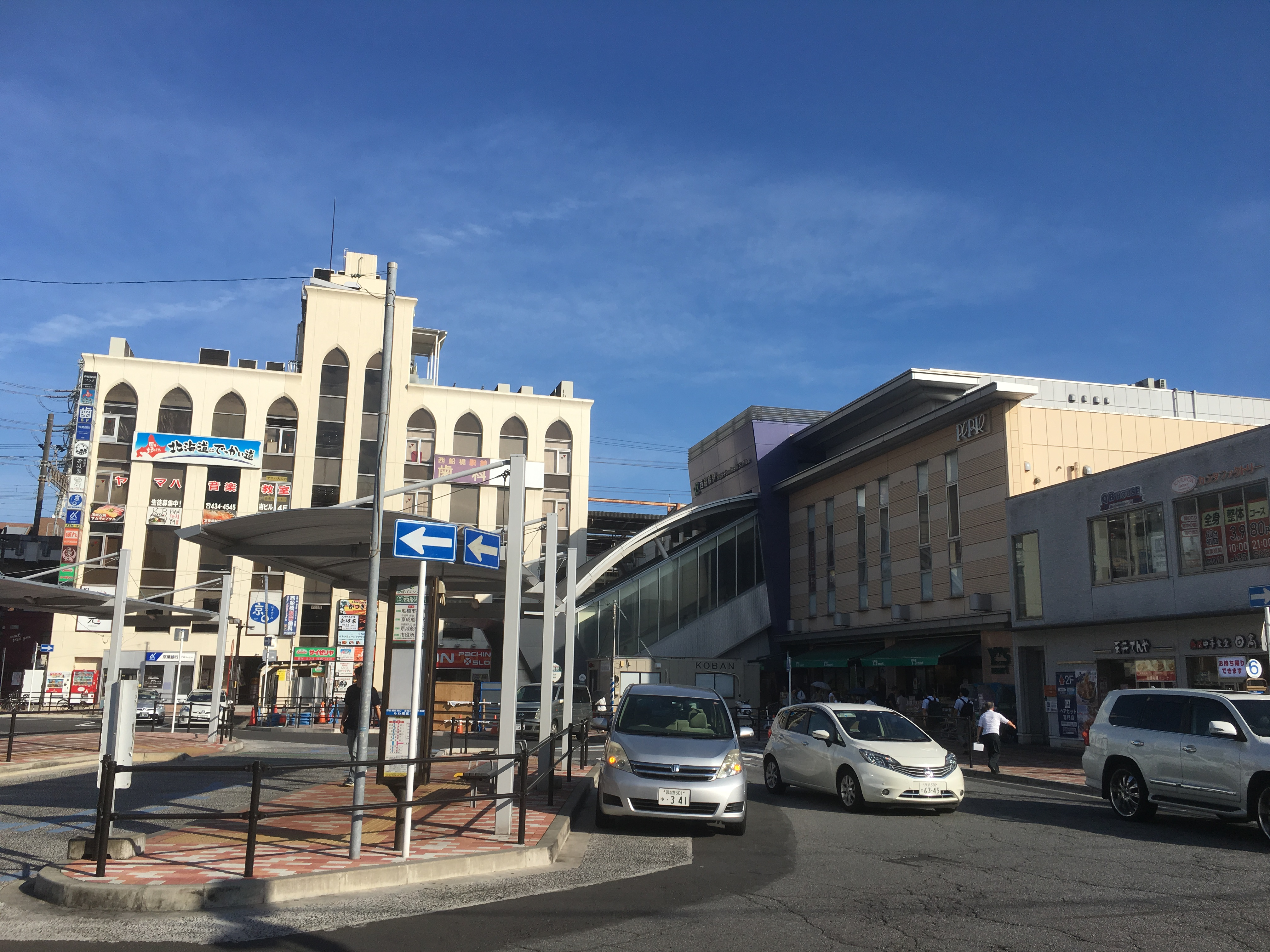 西船橋駅 (Nishi-Funabashi Station)